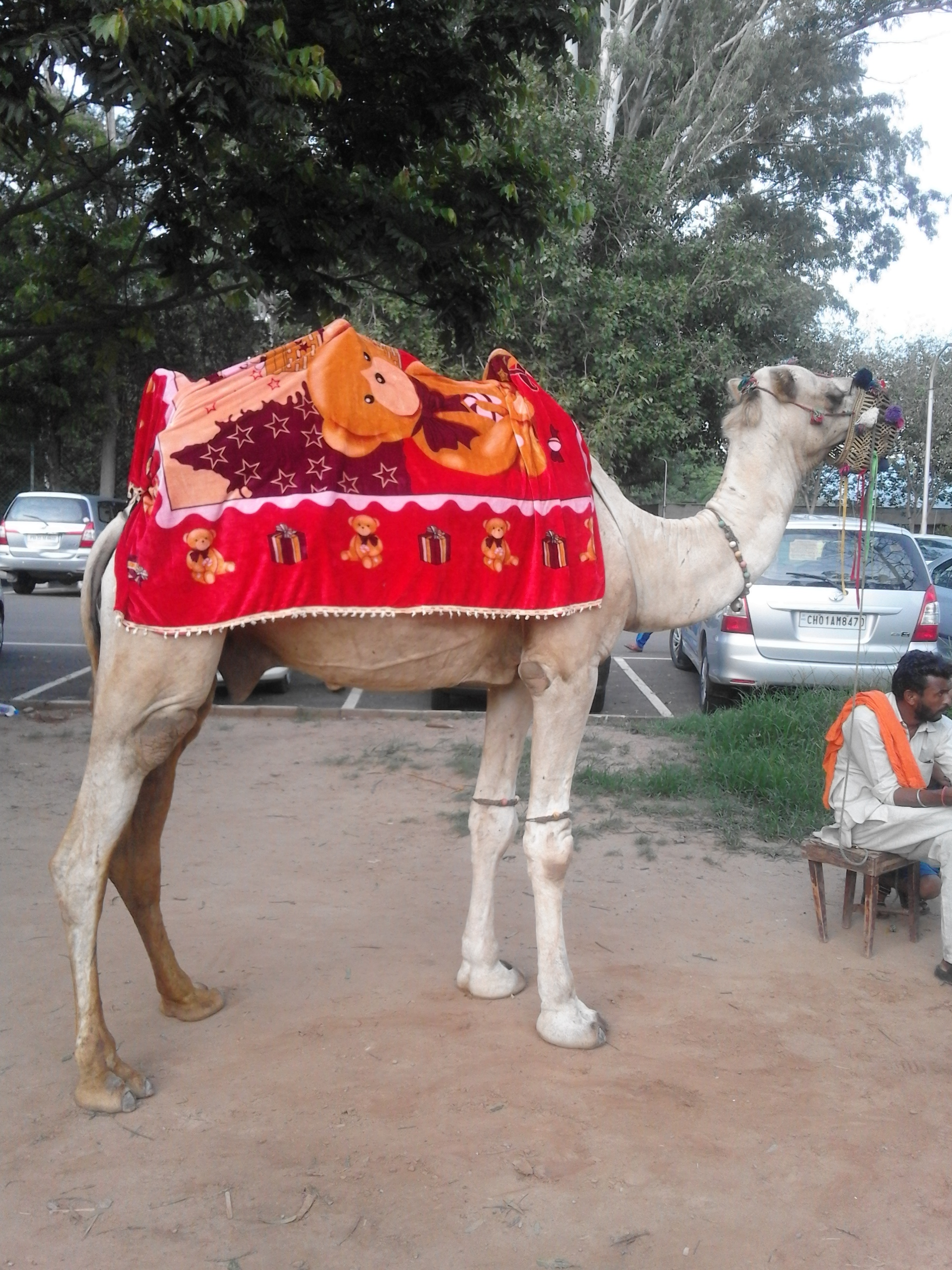 नेपाली: चन्डिगढको सुखना ताल स्थित प्रयटकहरूलाई घुमान प्रयोग गरिएको उँट